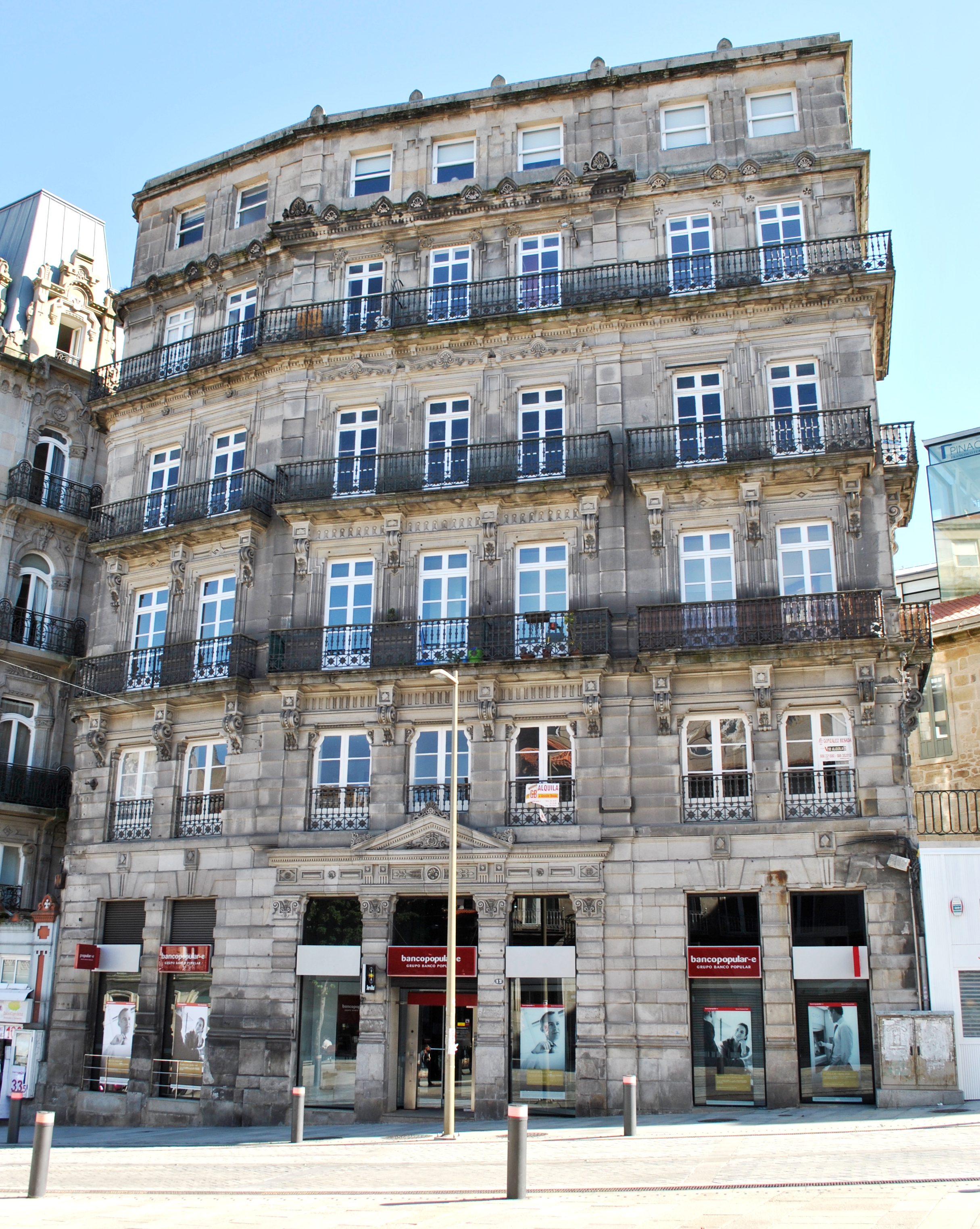 Véxase o título e as categorías.